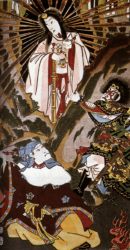 Amaterasu (天照) is in de Japanse mythologie de godin van de zon